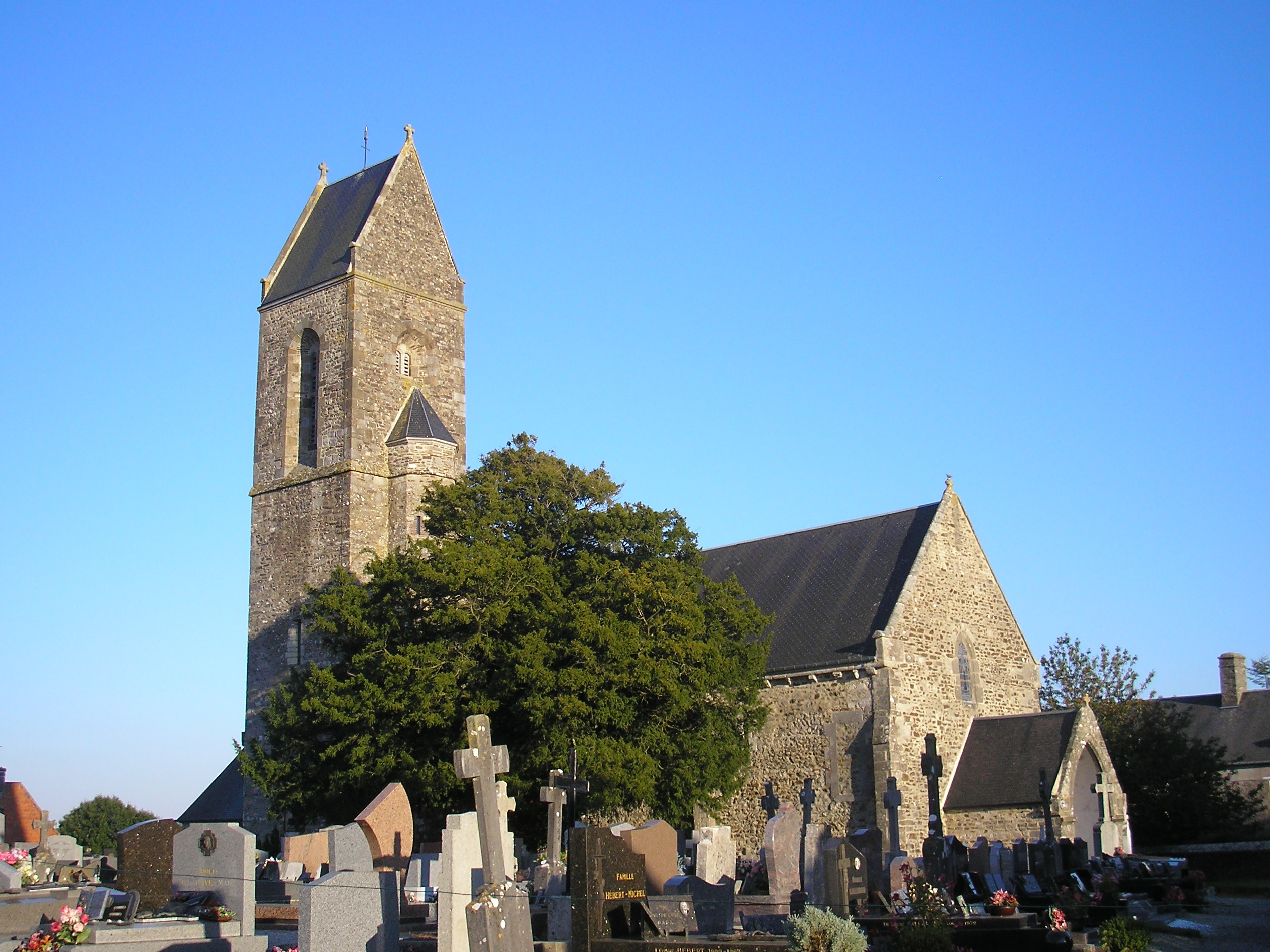 Savigny (Normandie, France). L'église Notre-Dame.